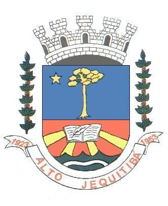 Brasão da cidade de Alto Jequitibá-MG